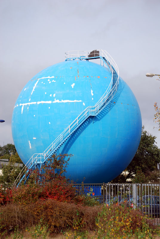 Gasbol voor beschildering